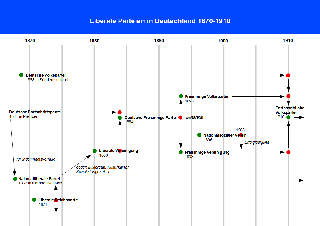 Liberale Parteien in Deutschland 1870 bis 1910.